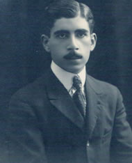 Antonio Medina Allende, político argentino (1895 - 1963), candidato a gobernador de Córdoba en 1946.